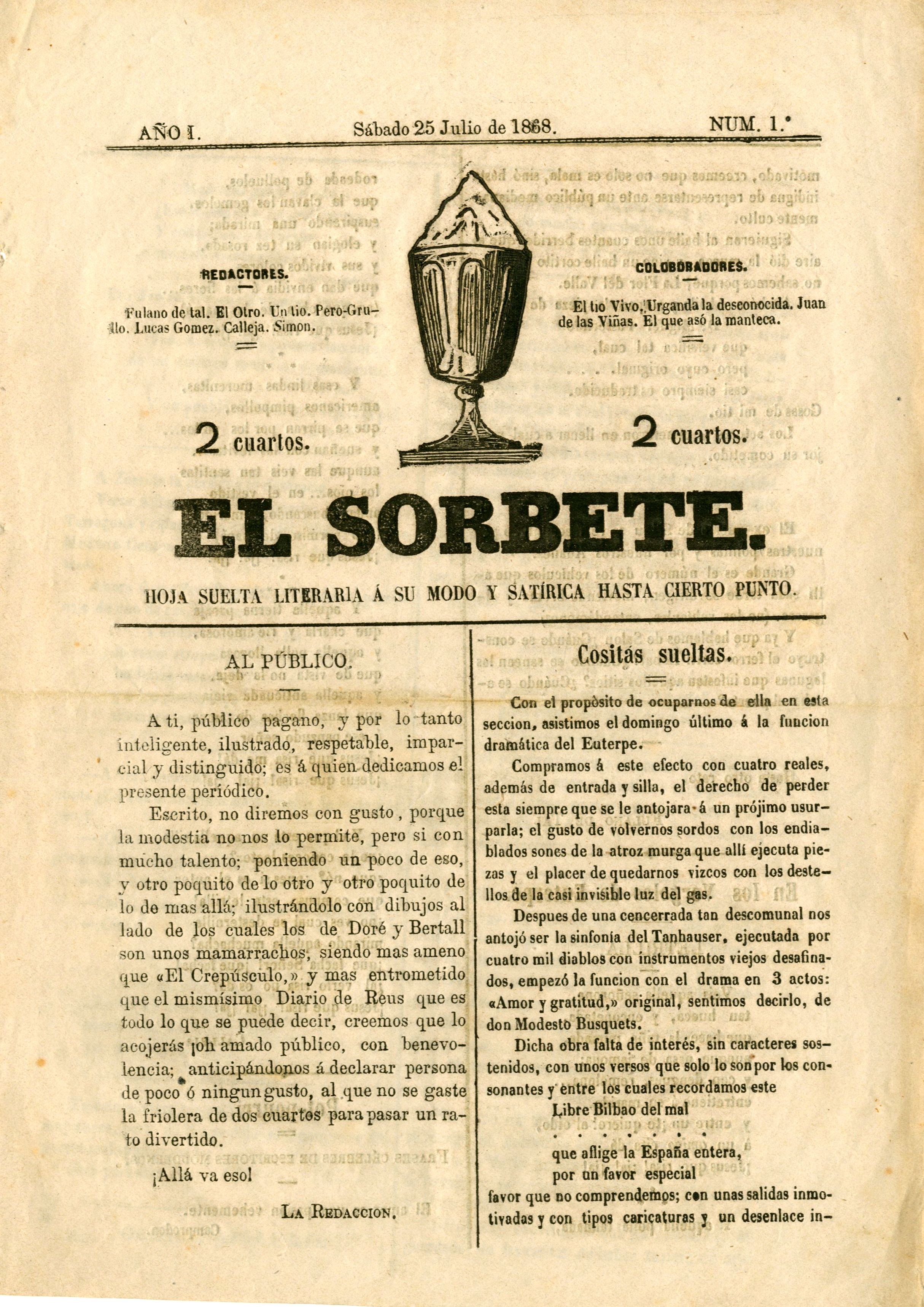 Primera pàgina de El Sorbete